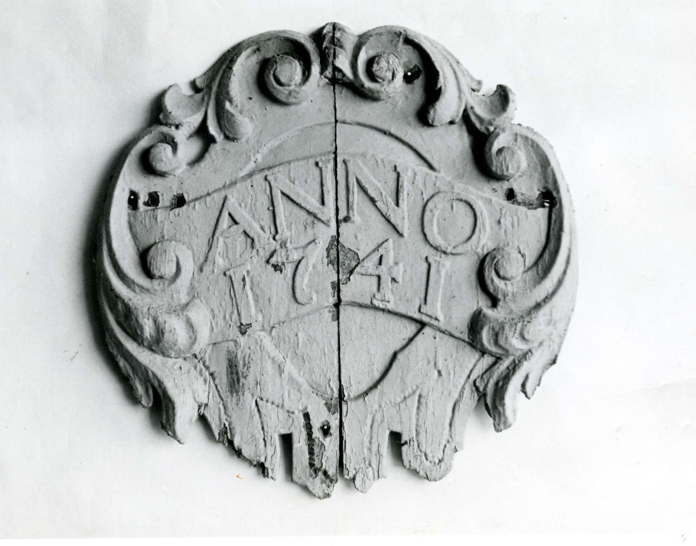 Houten herinneringsbord ter herinnering aan de brand van de boerderij van Gerrit Timmers aan de Nieuwstraat in Spijkenisse tijdens de grote dorpsbrand van 1741